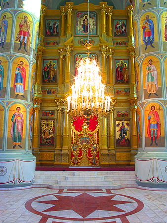 Inside in Uspensky sobor in Kolomna